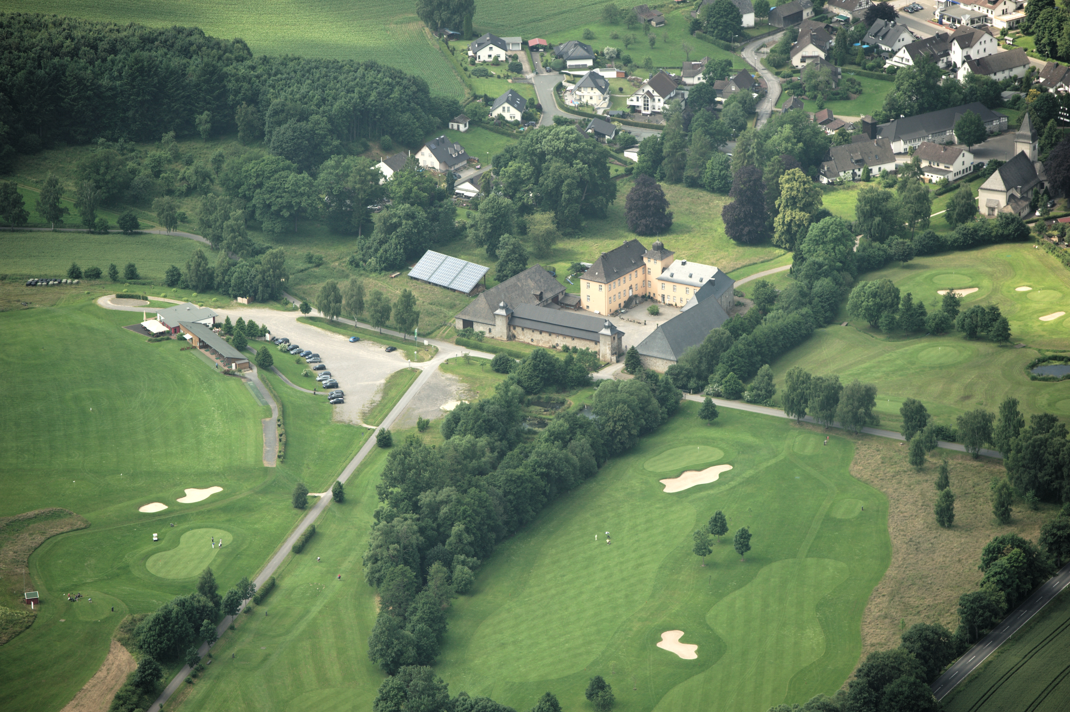 Fotoflug Sauerland-Ost - Sundern, Haus Amecke von Südosten, links neben Haus Amecke die Gebäude des Golfplatzes Amecke und am oberen Bildrand der südliche Teil von Amecke The making of this document was supported by the Community-Budget of Wikimedia Germany.